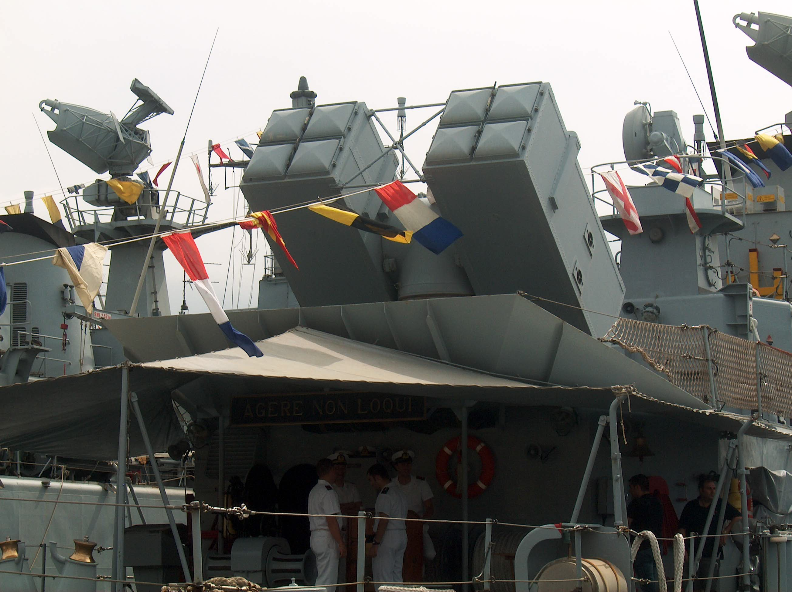 Particolare del sistema lanciatore ottuplo del sistema antiaereo Albatros/Aspide con sopra il radar di direzione tiro della corvetta Danaide